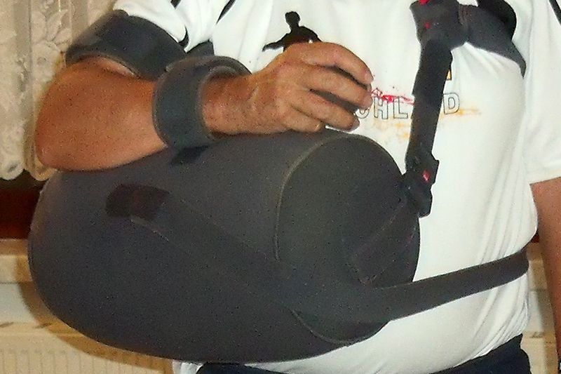 Briefträgerkissen, aufblasbare Variante, eingesetzt nach einer Schulter-Operation